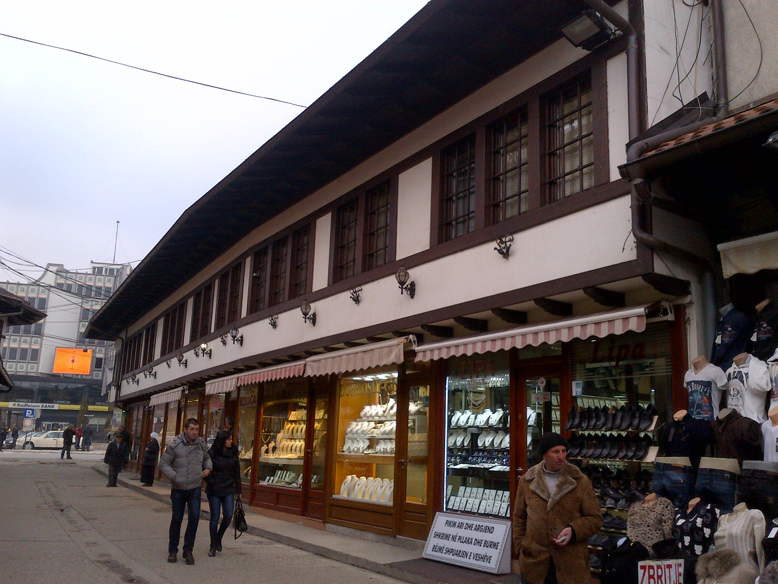 Pamje nga Çarshia e gjatë e Pejës